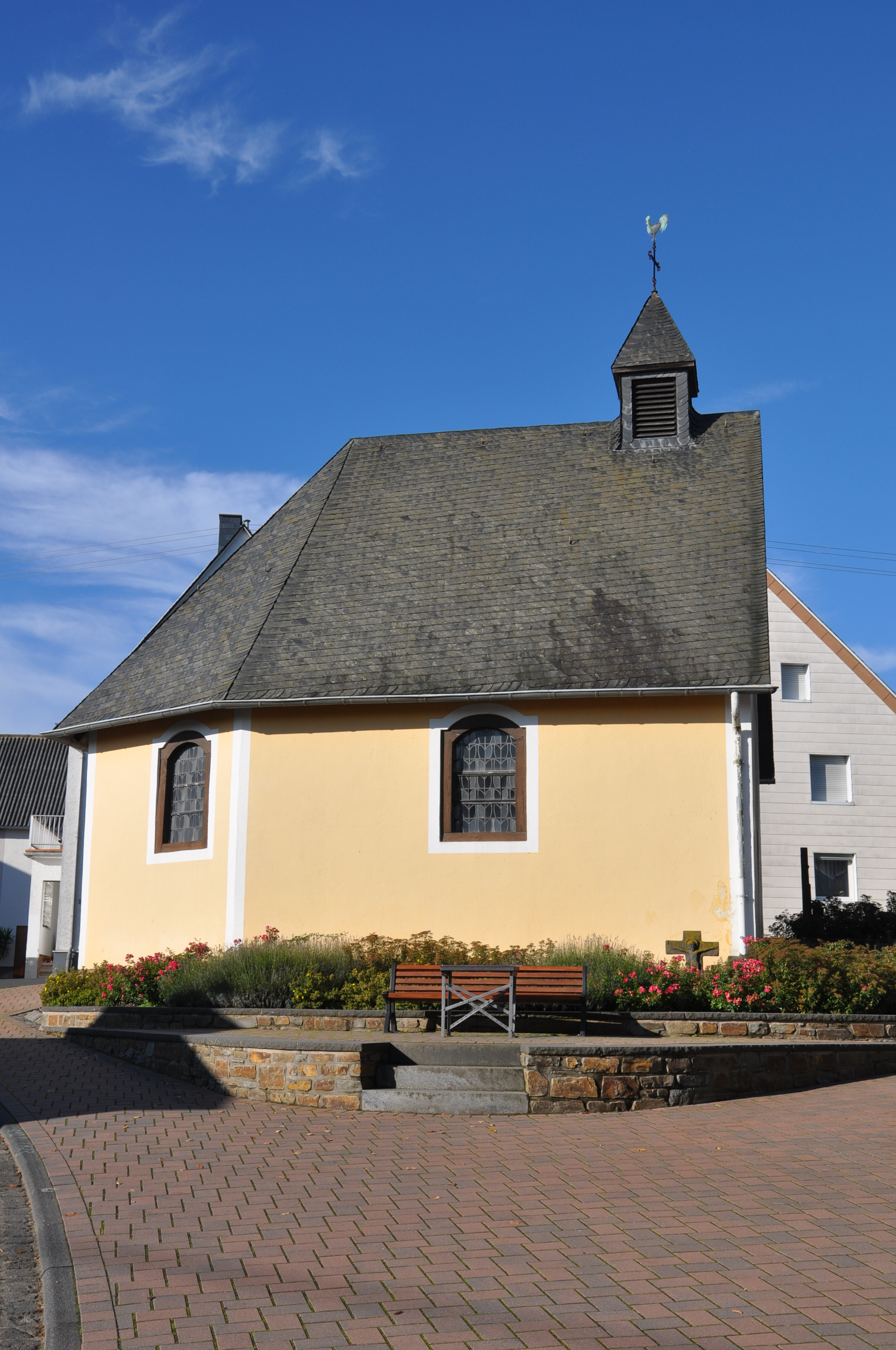 Kaifenheim, Kapelle St. Wendelinus (Wendelin)